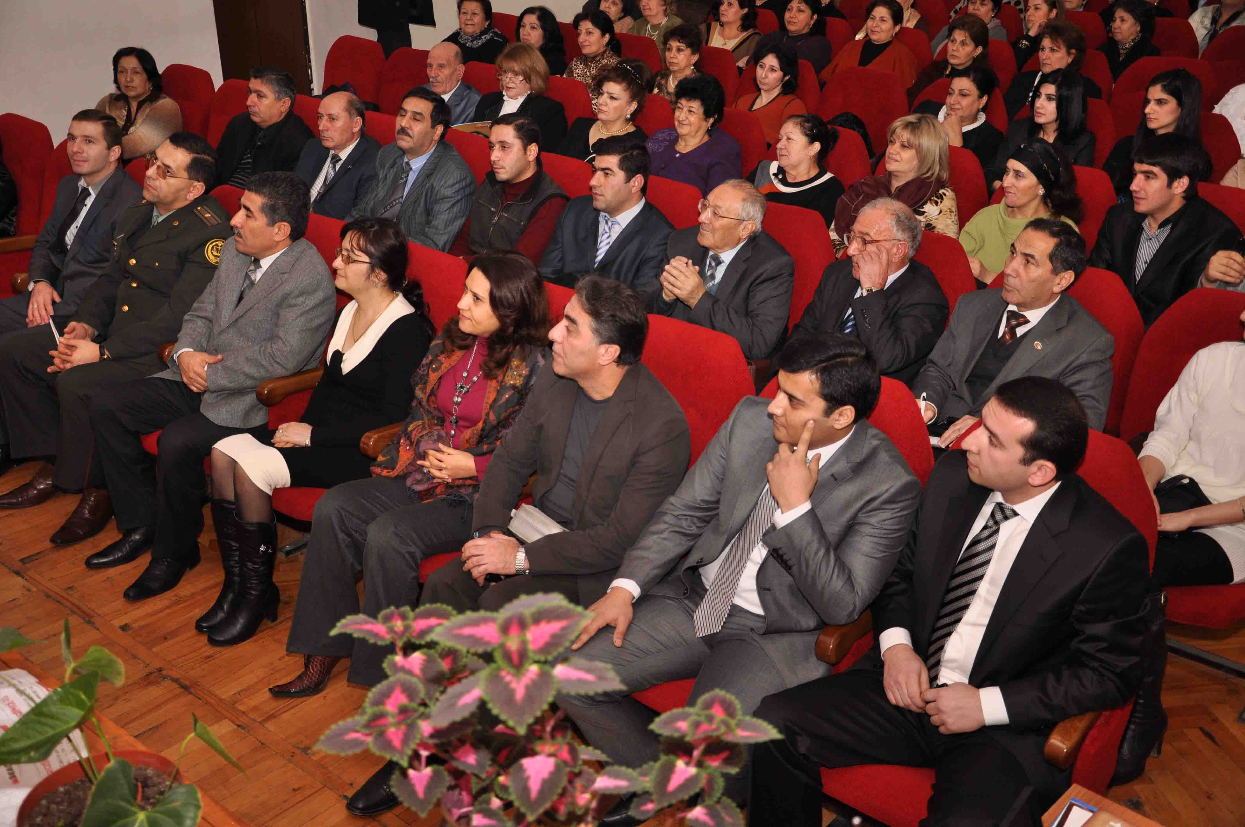 ““Füyuzat” və Gənc nəsil”